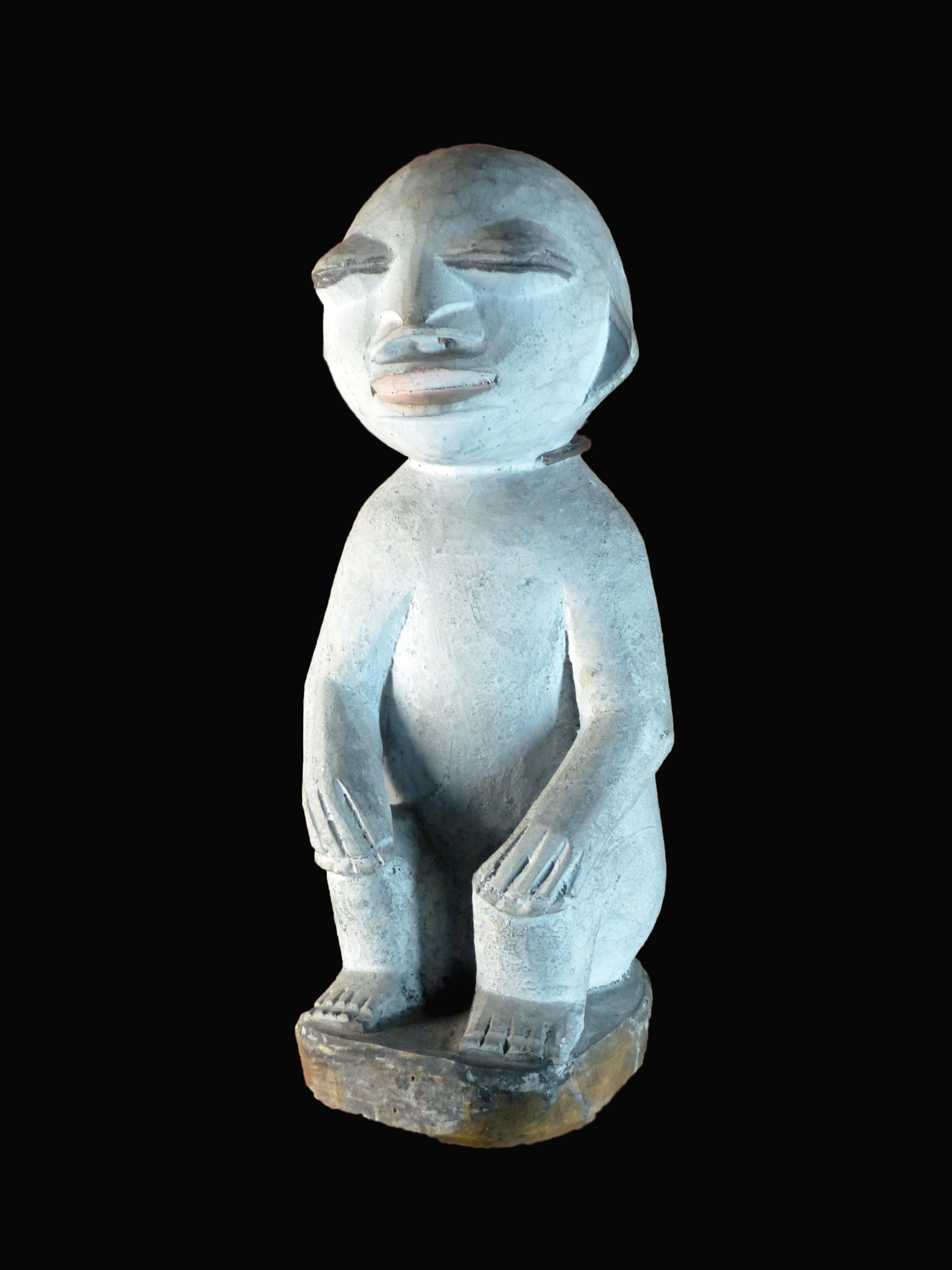 Poterie Fon. Bénin. Avant 1900. Musée africain de Lyon.